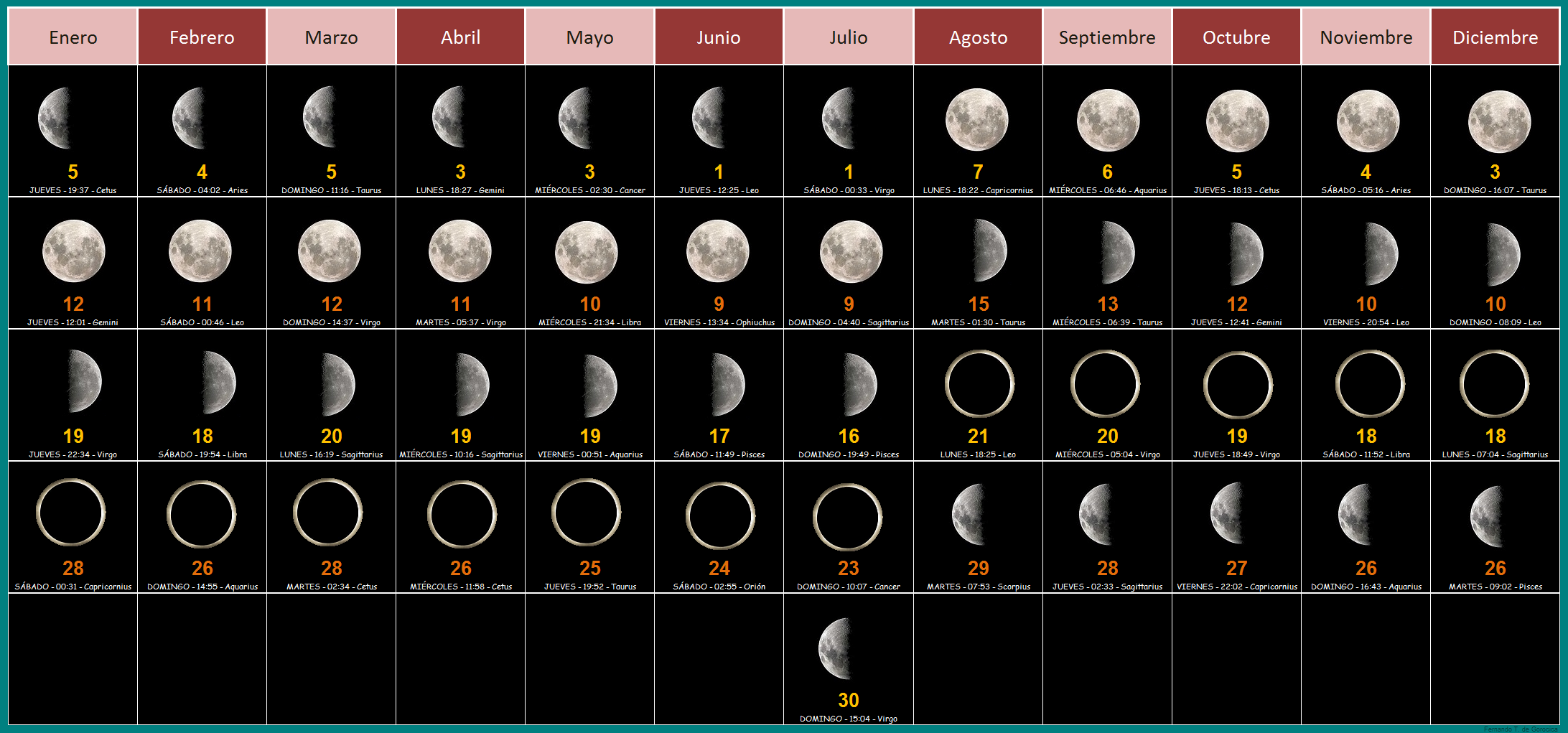 CALENDARIO LUNAR 2017 . Las 4 fases lunares en todo el año 2017 y para observadores del hemisferio Sur. Para cada fase se describe: día del mes, día de la semana, hora de la fase en Tiempo Universal (Greenwich) y constelación.